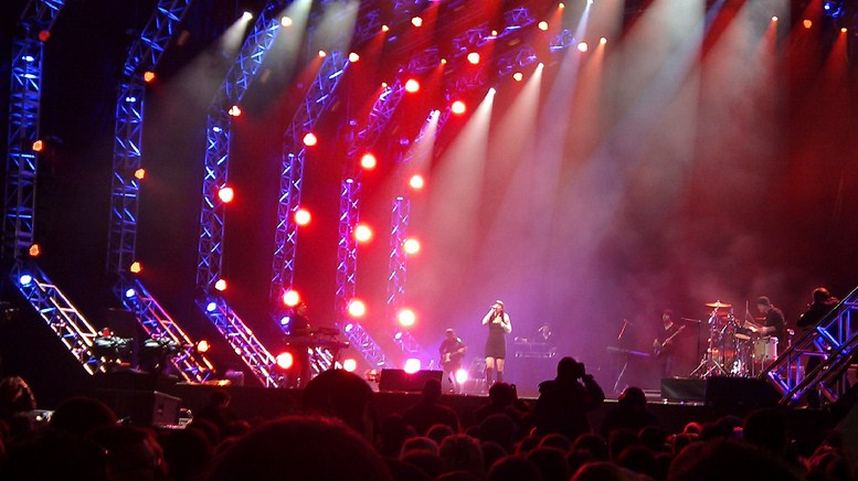 Agnieszka Chylińska, Orange Warsaw Festival 2010.